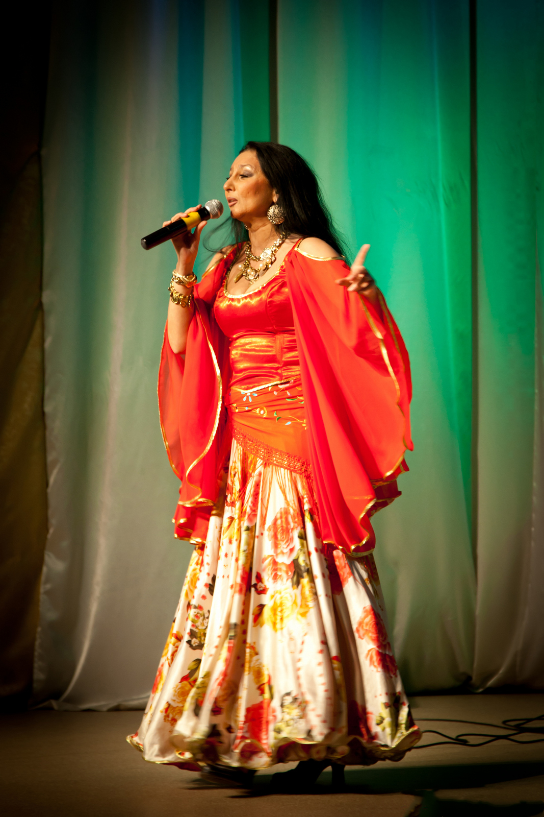 Московский музыкально-драматический цыганский театр «Ромэн»; концерт в ЦКиОМ города Северодвинска 23 февраля 2014 года. На снимке племянница Народного артиста СССР Николая Сличенко.